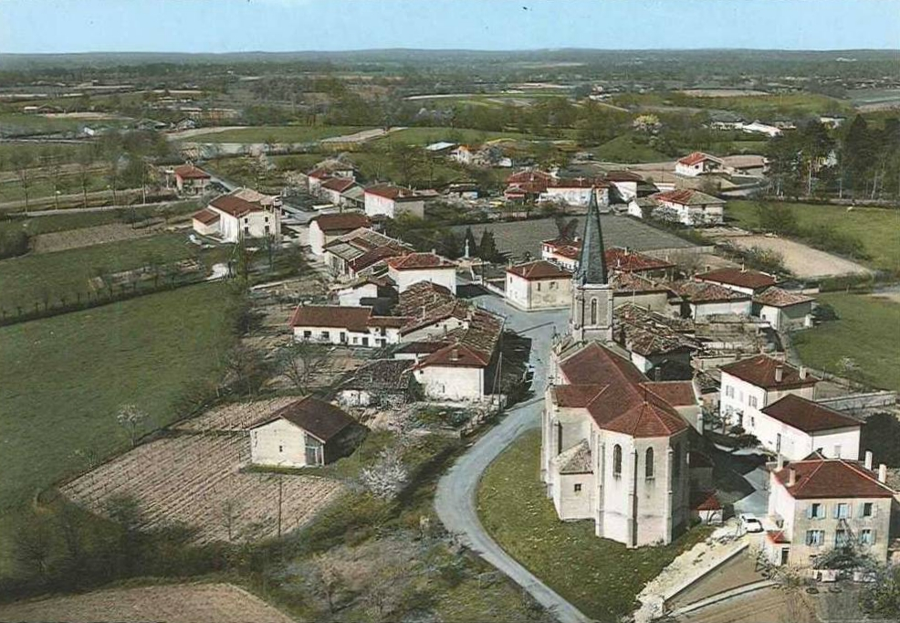 Vue aérienne du bourg de Saint-Cyr-sur-Menthon.